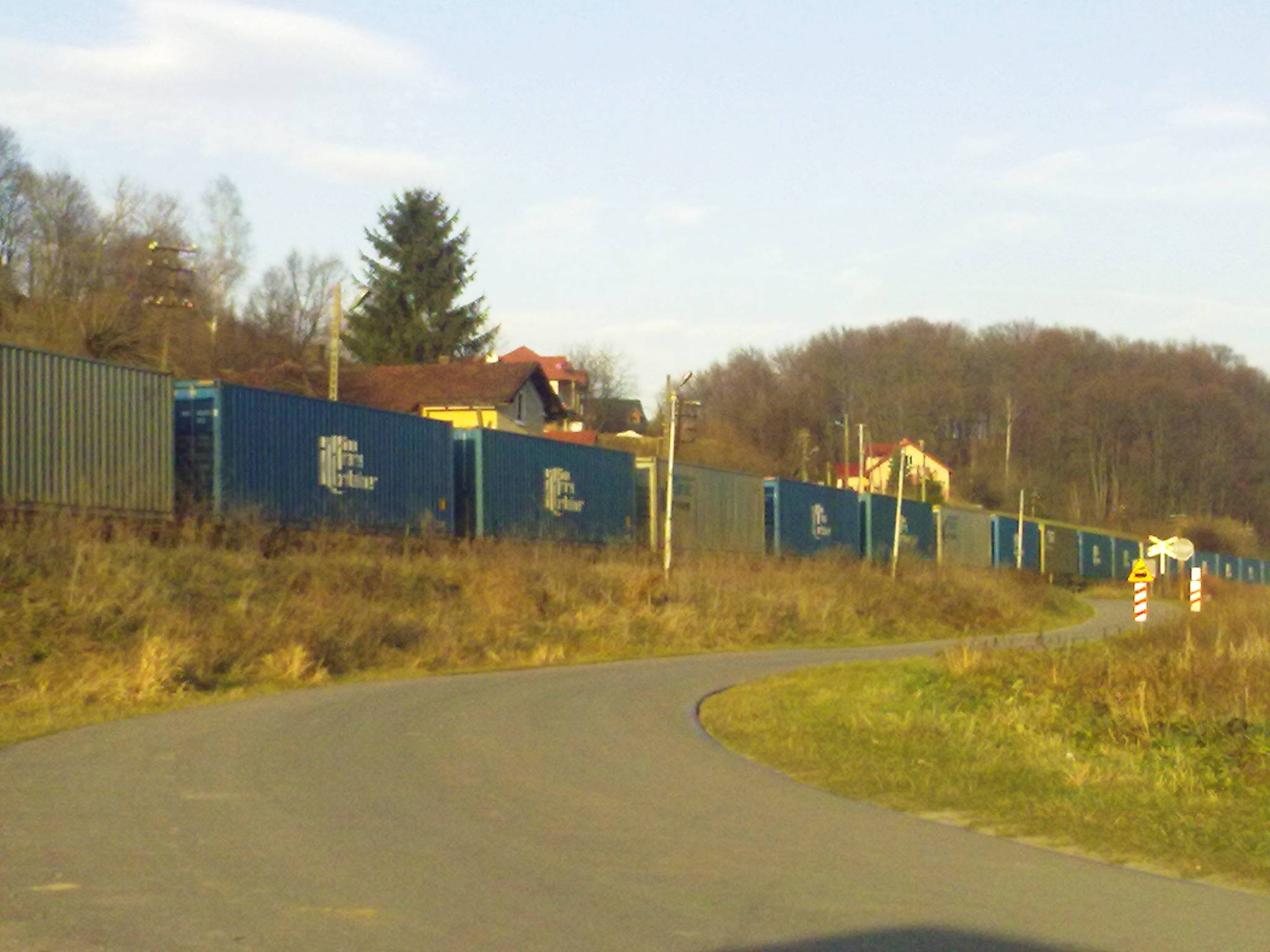 Pociąg towarowy na stacji Czszyn